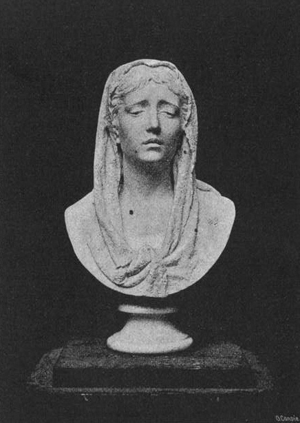 Taurigkeit. Marmorbüste